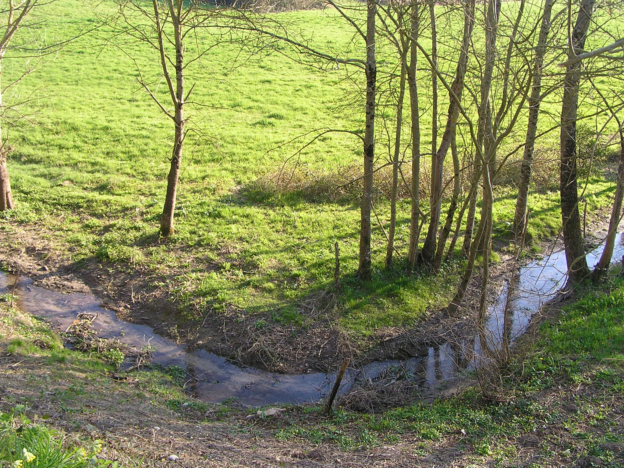 L’Antenne vers sa source à Fontaine-Chalandray.